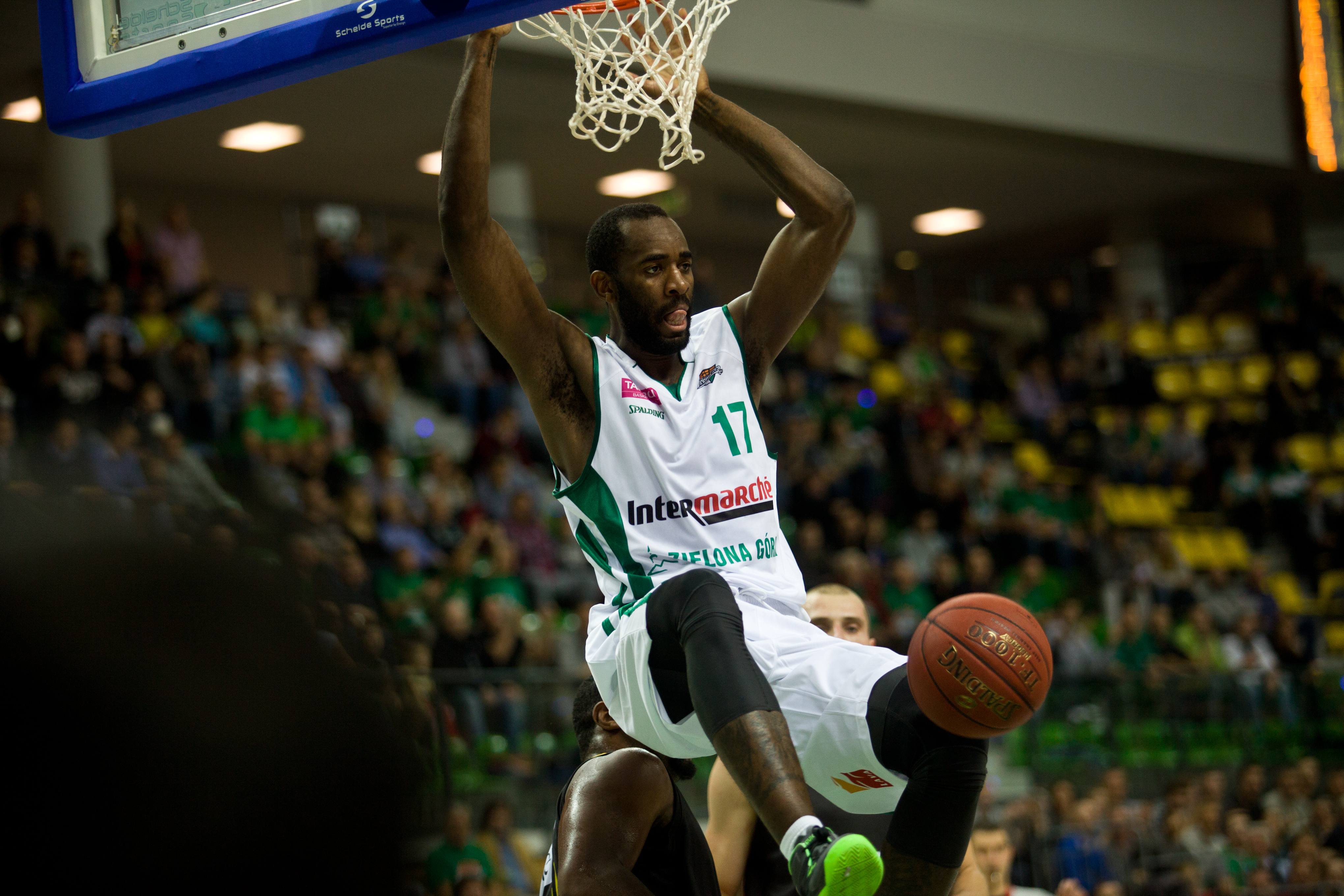 Christian Eyenga, Stelmet Zielona Góra